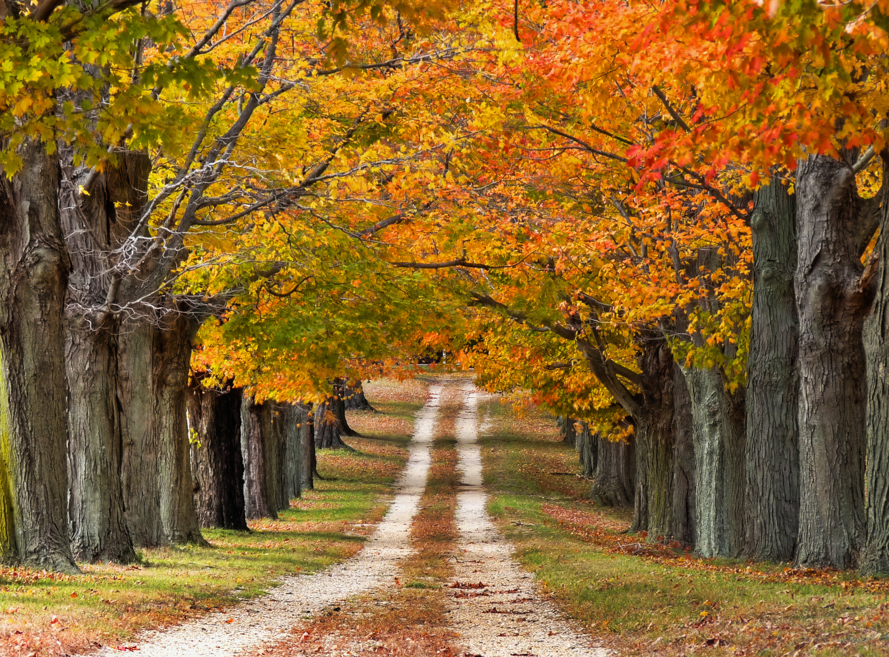 Millstone, NJ.